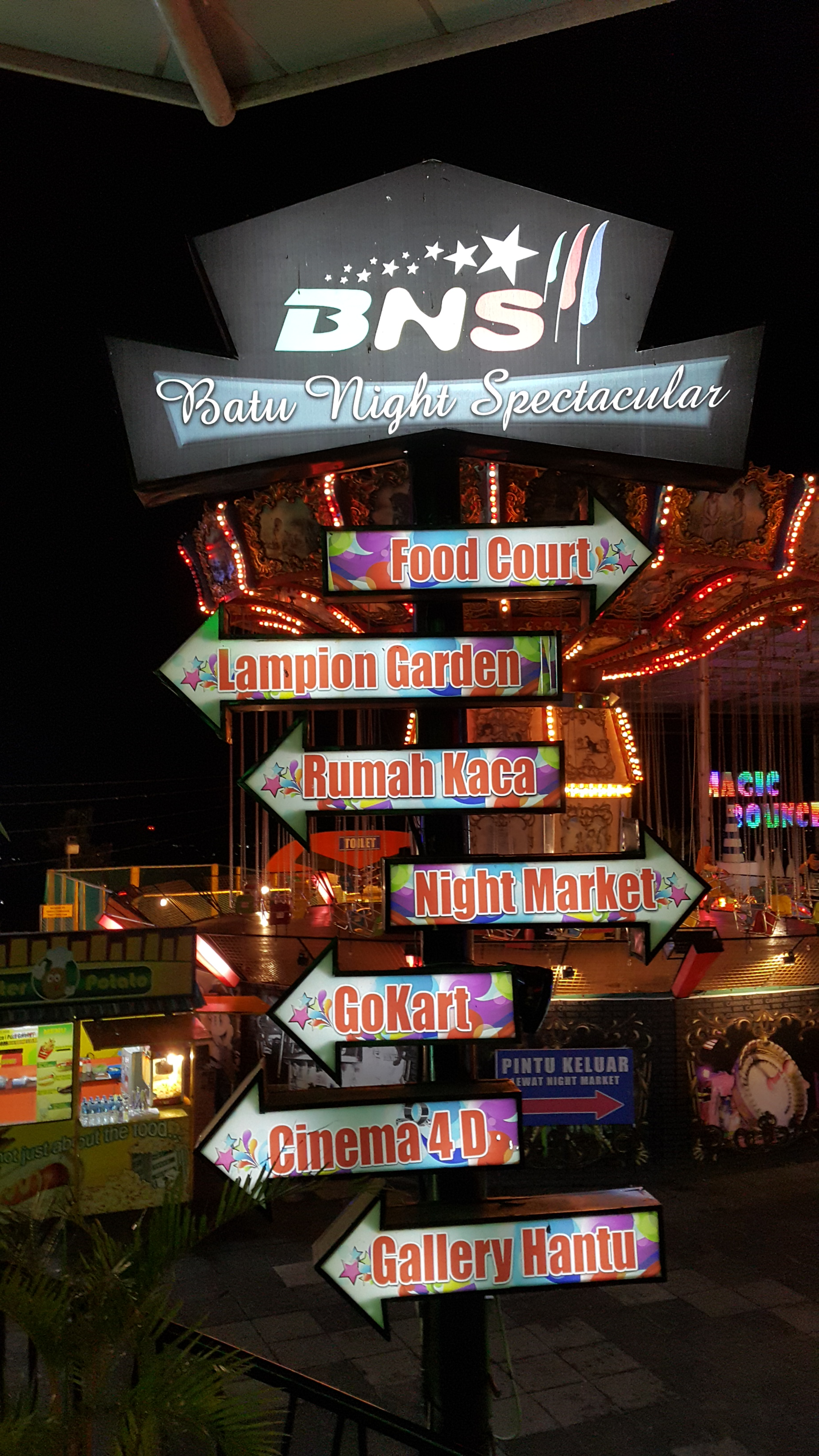 Pintu Masuk BNS